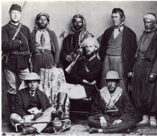 Группа Фрешфильда 1868 года. Сидят слева - К. Таккер, справа - д. Фрешфильд, по центру - А. Мур.